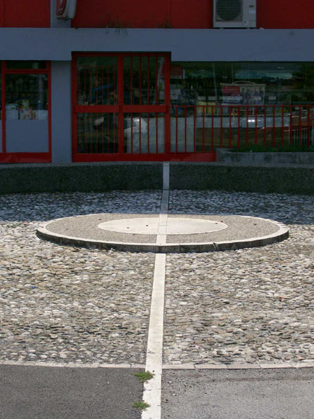 16 meridijan Zagreb (Vukovarska-Držićeva)